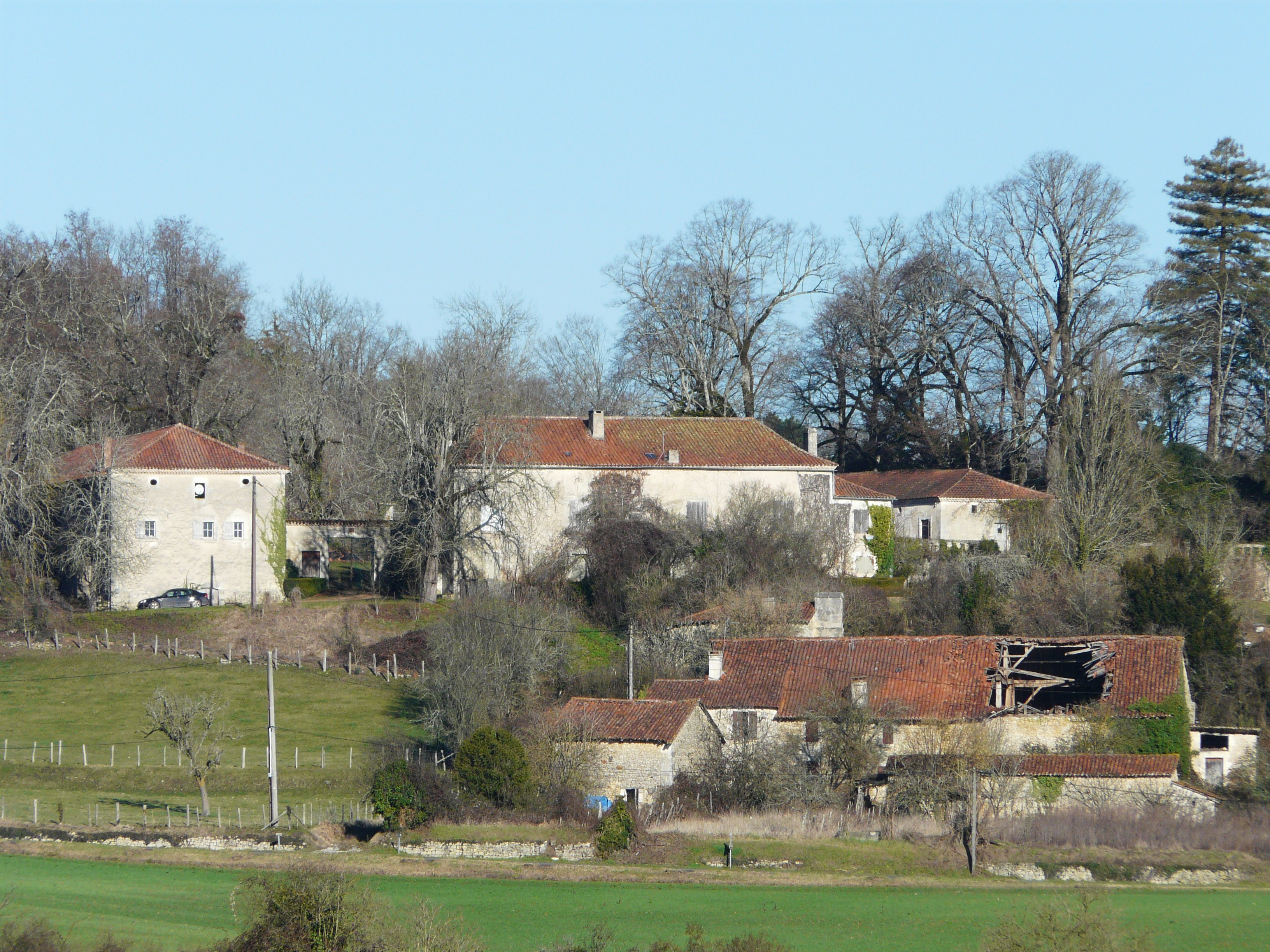 Le hameau de Saint-Michel, Cantillac, Dordogne, France.